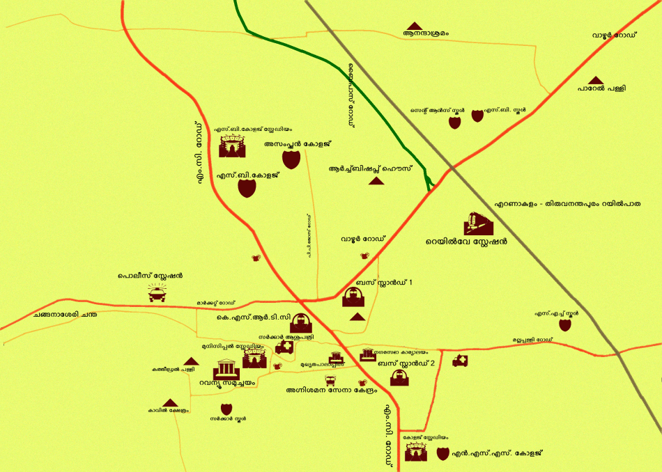 ചങ്ങനാശേരി പട്ടണത്തിലെ പ്രധാനപാതകളും സ്ഥാപനങ്ങളും.